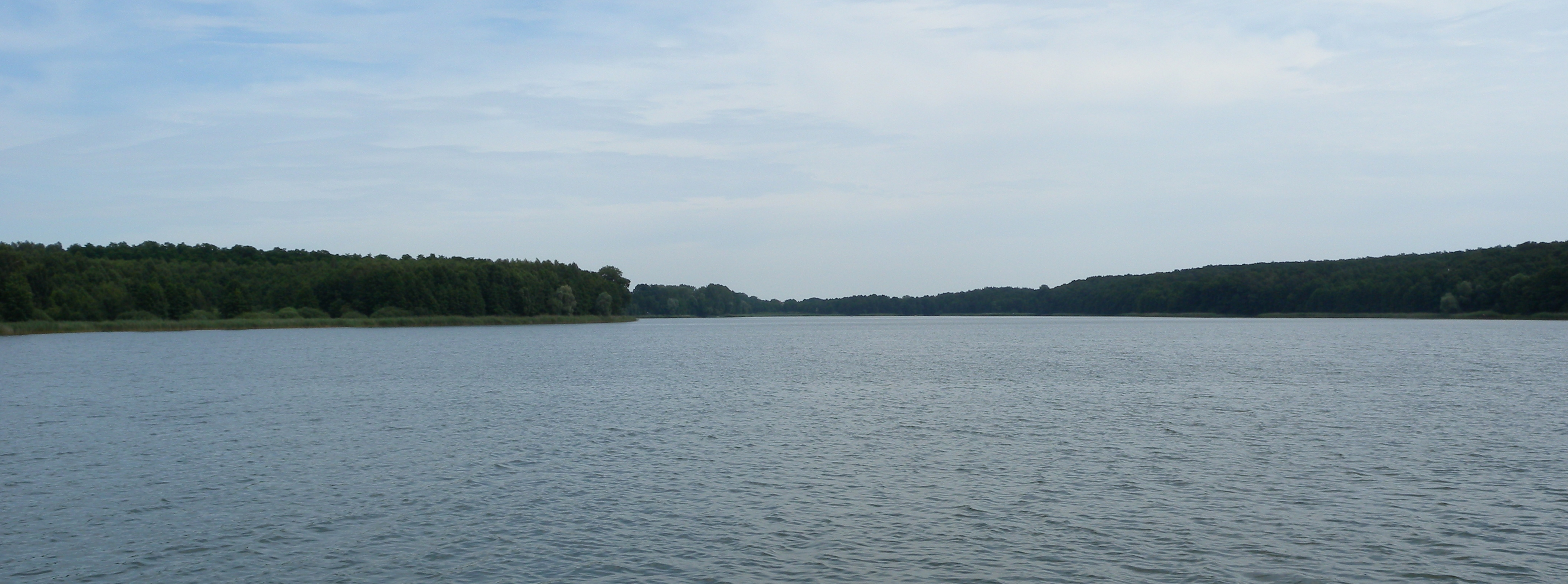 Jezioro Ostrowieckie